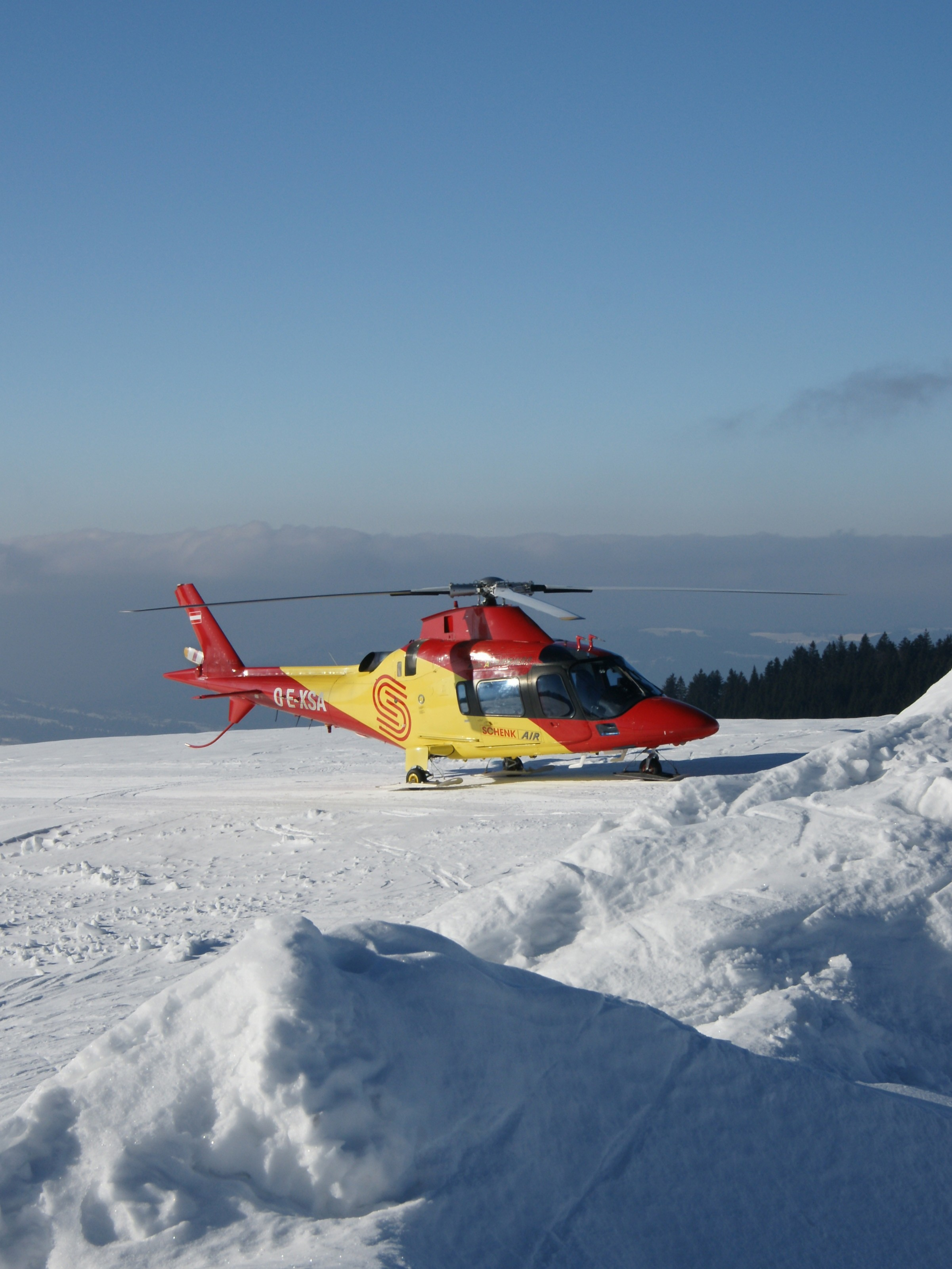 Agusta A109 Power der Schenkair [1] in Warteposition zur Bergung eines Skiunfallopfers neben der Gehrenalpe am Hochhäderich in Hittisau.